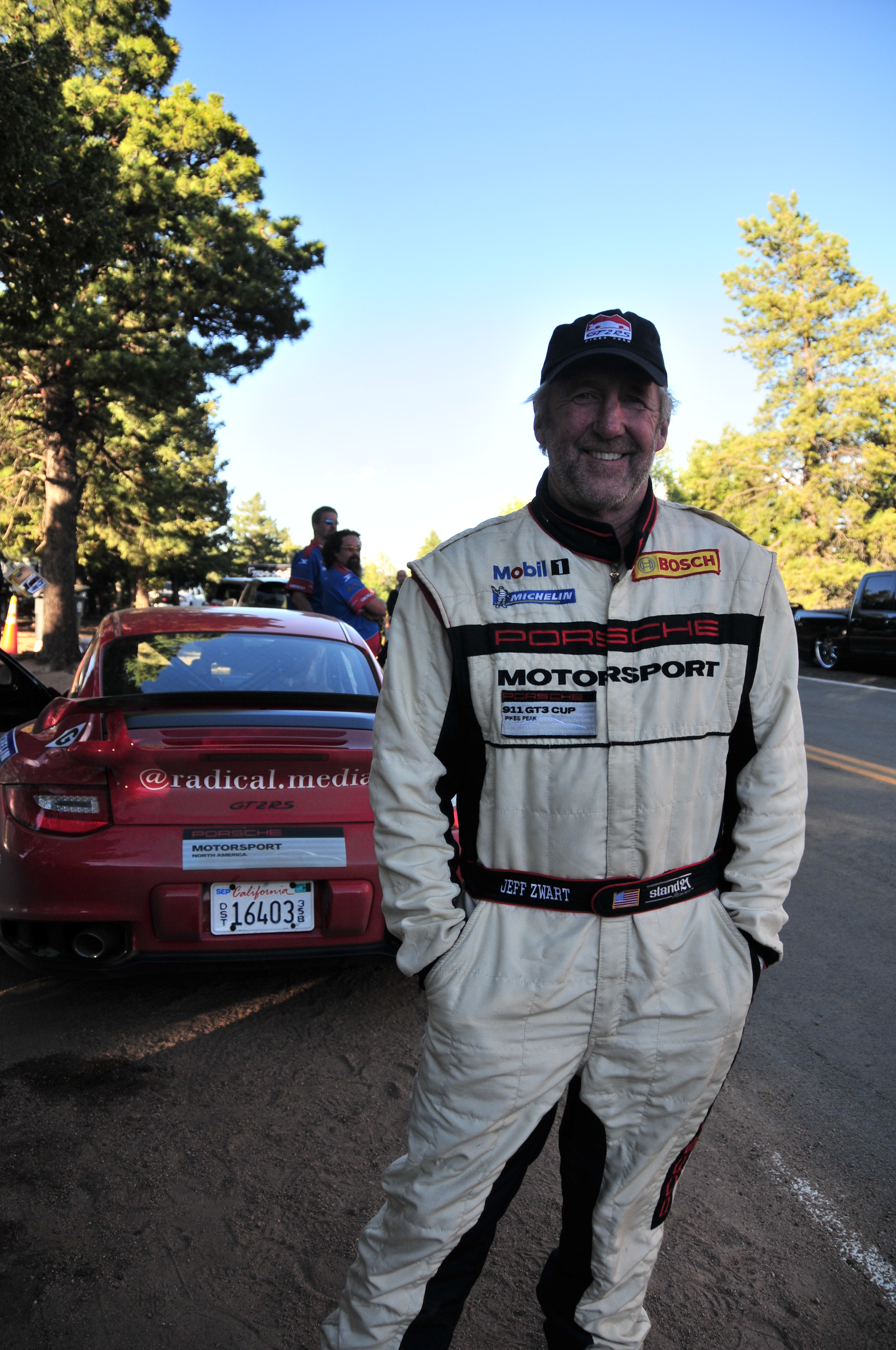 11J_6647